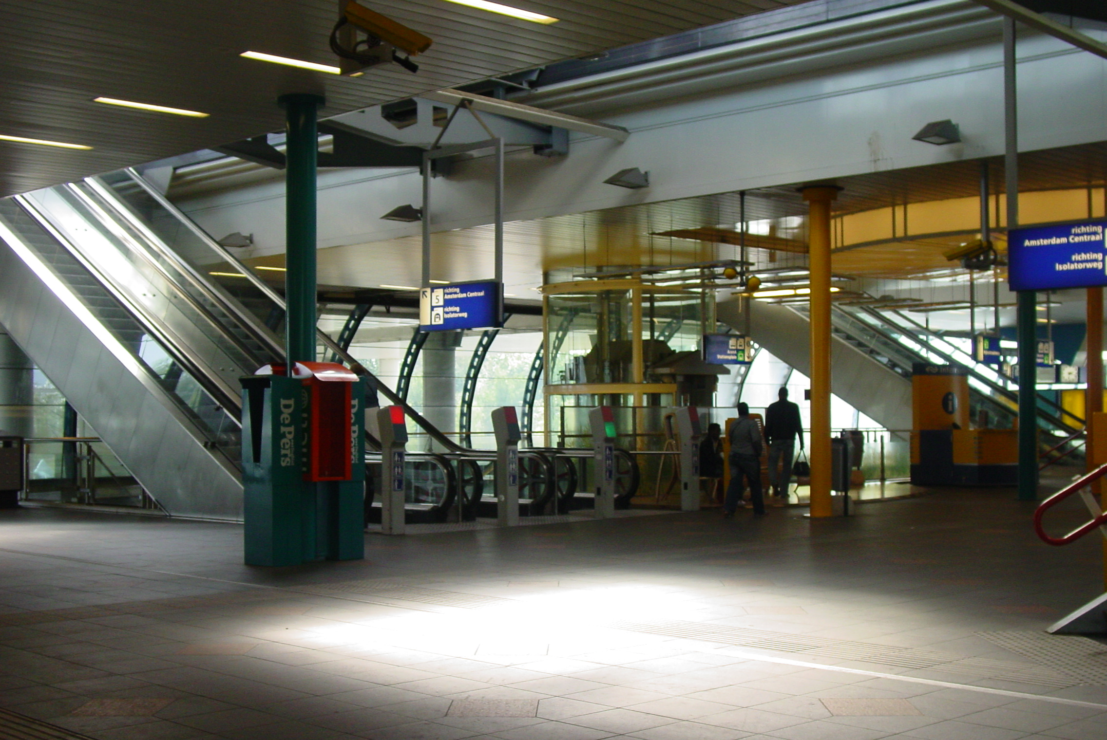 De stationshal van Station Duivendrecht.